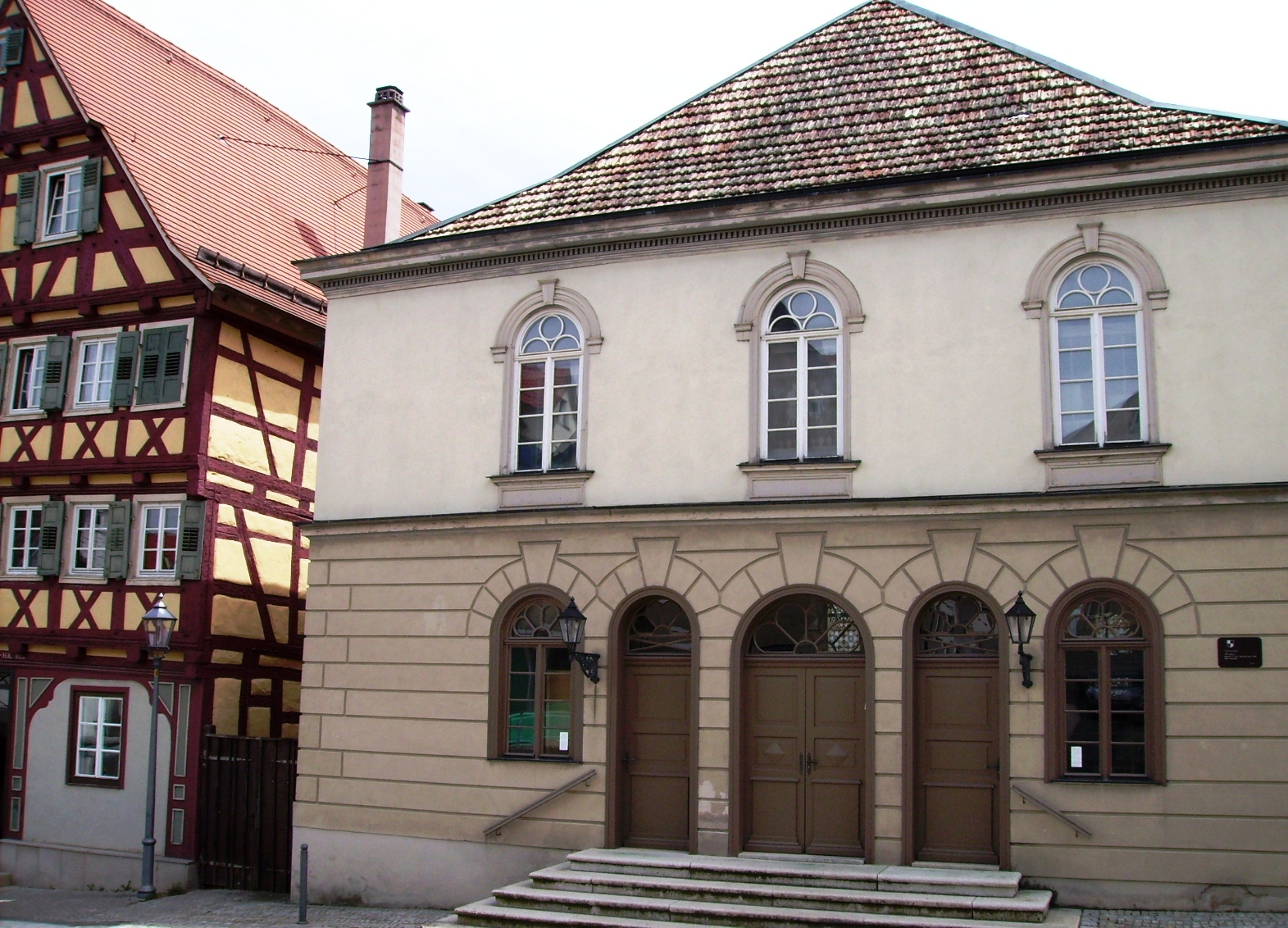 Hechingen, Germany